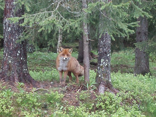 Red fox (Vulpes vulpes) (no: rev or rødrev) from Namsskogan wildlife park, Norway